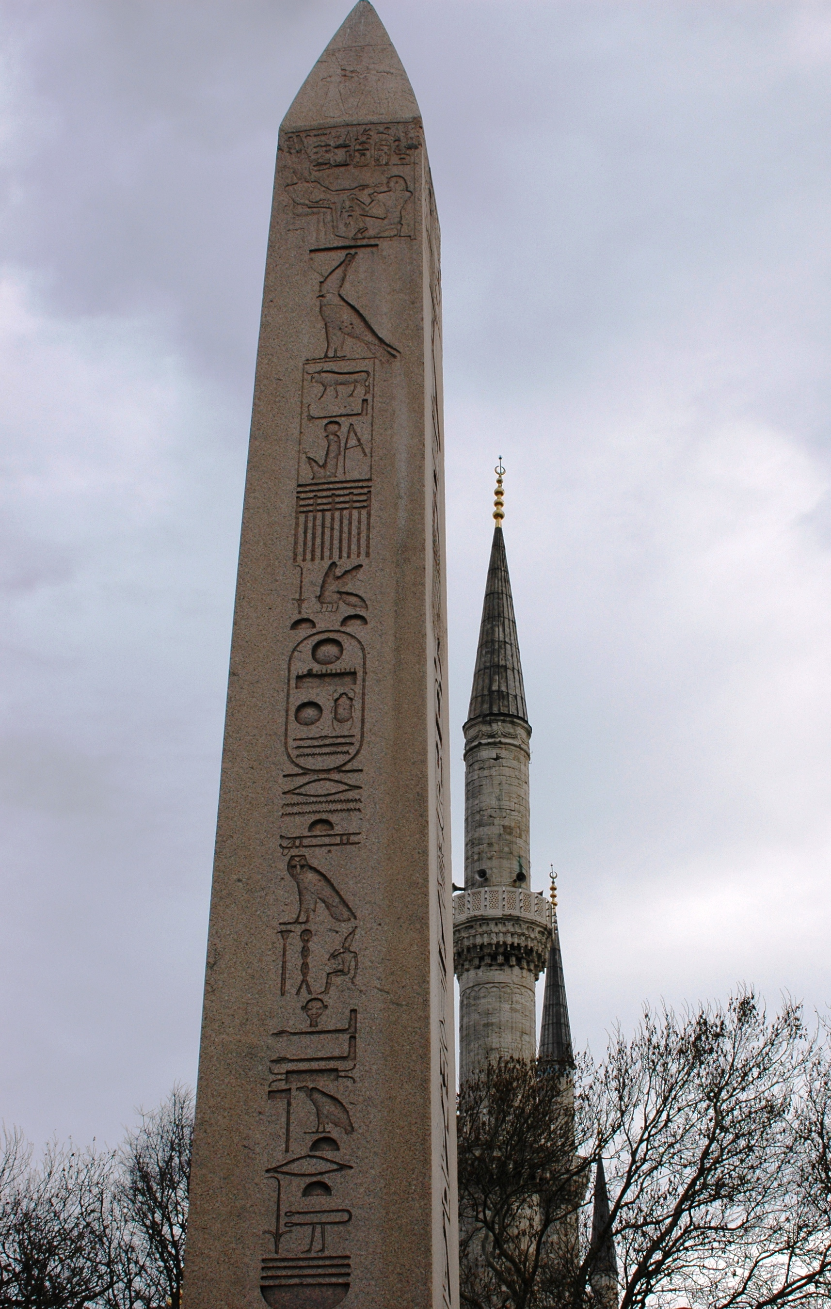 Istanbul - Obelisc de Teodosi